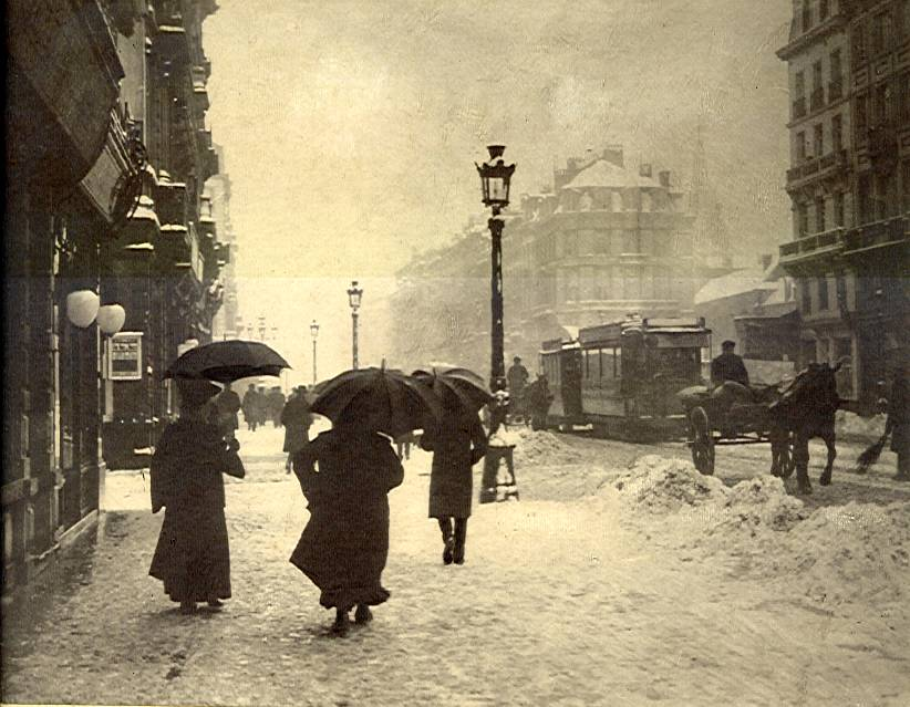 Fontainasplein, Brussel